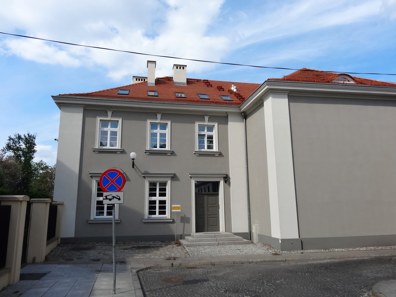 Dom Katolicki w Bydgoszczy przy katedrze